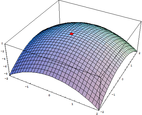 Afbeelding voor wiskundige pagina over stationaire punten. Afbeelding mag vrij gebruikt worden. Zelf gemaakt.